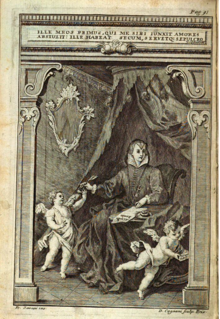 Veronica Gambara writing to Pietro Bembo. From Rime e lettere raccolte da Felice Rizzardi (Brescia, 1759)